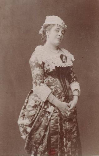 Anna Judic comédienne